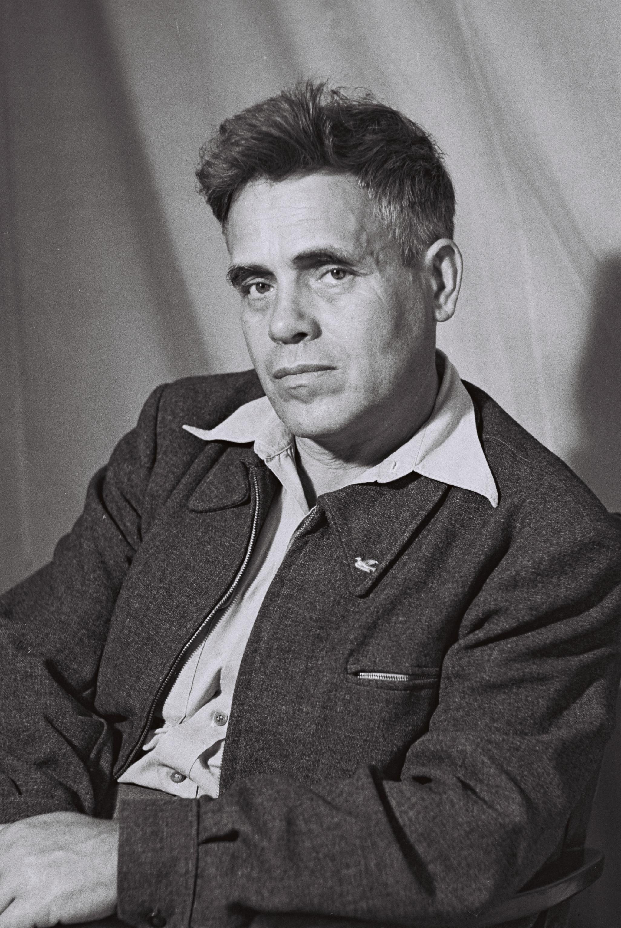 portrait of Yaakov Hazan